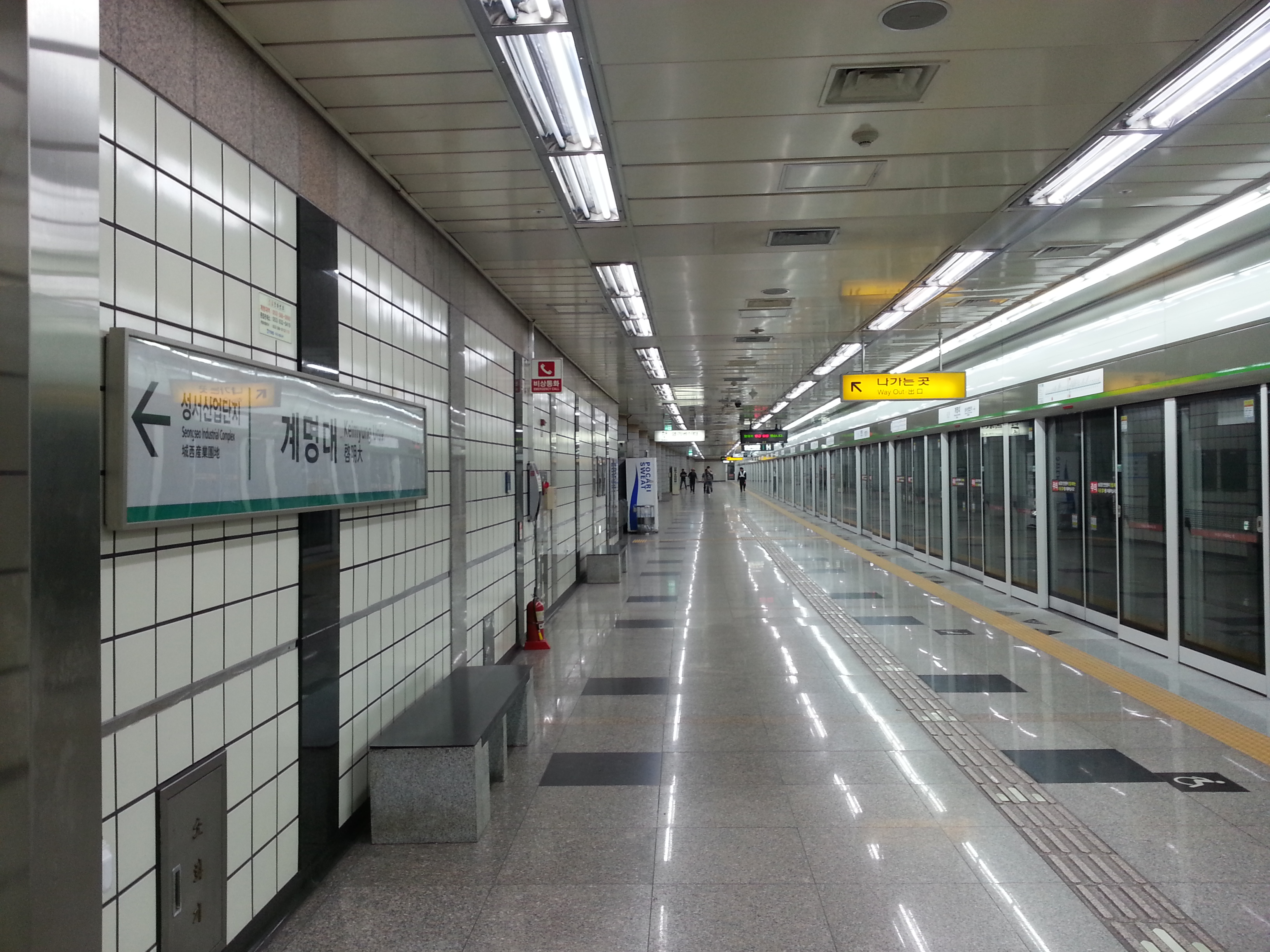 대구 도시철도 2호선 계명대역 영남대 방면 승강장